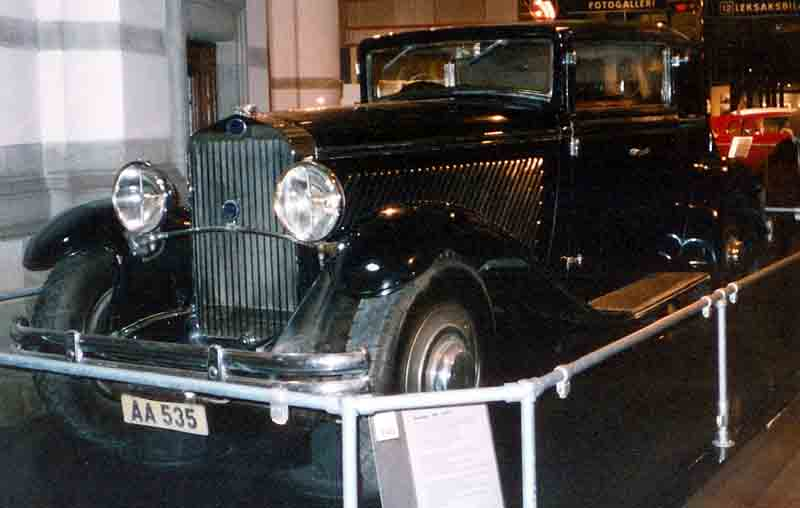 Delage D.8 Saloon 1931